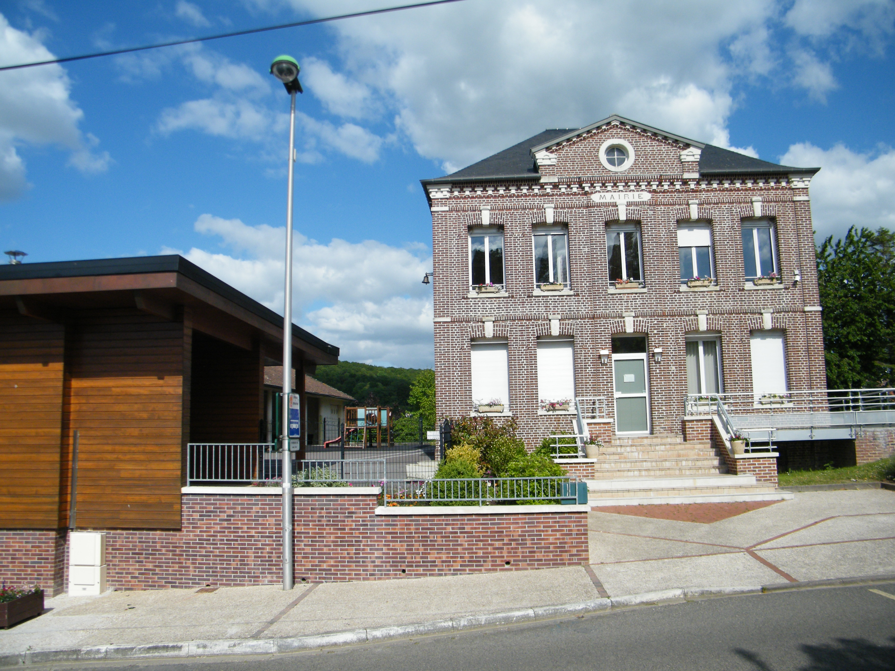 Mairie.